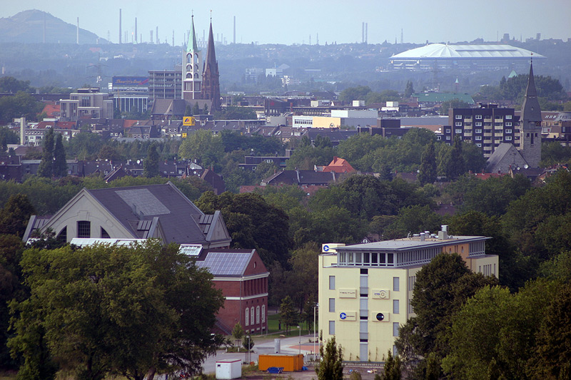 Blick auf Gelsenkirchen von der „Himmelstreppe“ aus. Zu sehen ist im Vordergrund die ehemalige Zeche Rheinelbe, heute Sitz des „Lichthofs“, einer Fortbildungsstätte des Landes Nordrhein-Westfalen, des „Europäischen Hauses der Stadtbaukultur“ und eines Gründerzentrums. Im Mittelgrund die Innenstadt Gelsenkirchens, dahinter die „Veltins Arena“ - ehemals „Arena AufSchalke“. Im Hintergrund rechts die Innenstadt Gelsenkirchen-Buers, links die Schornsteine der VEBA-Raffinerien und die Bergehalde Scholven.